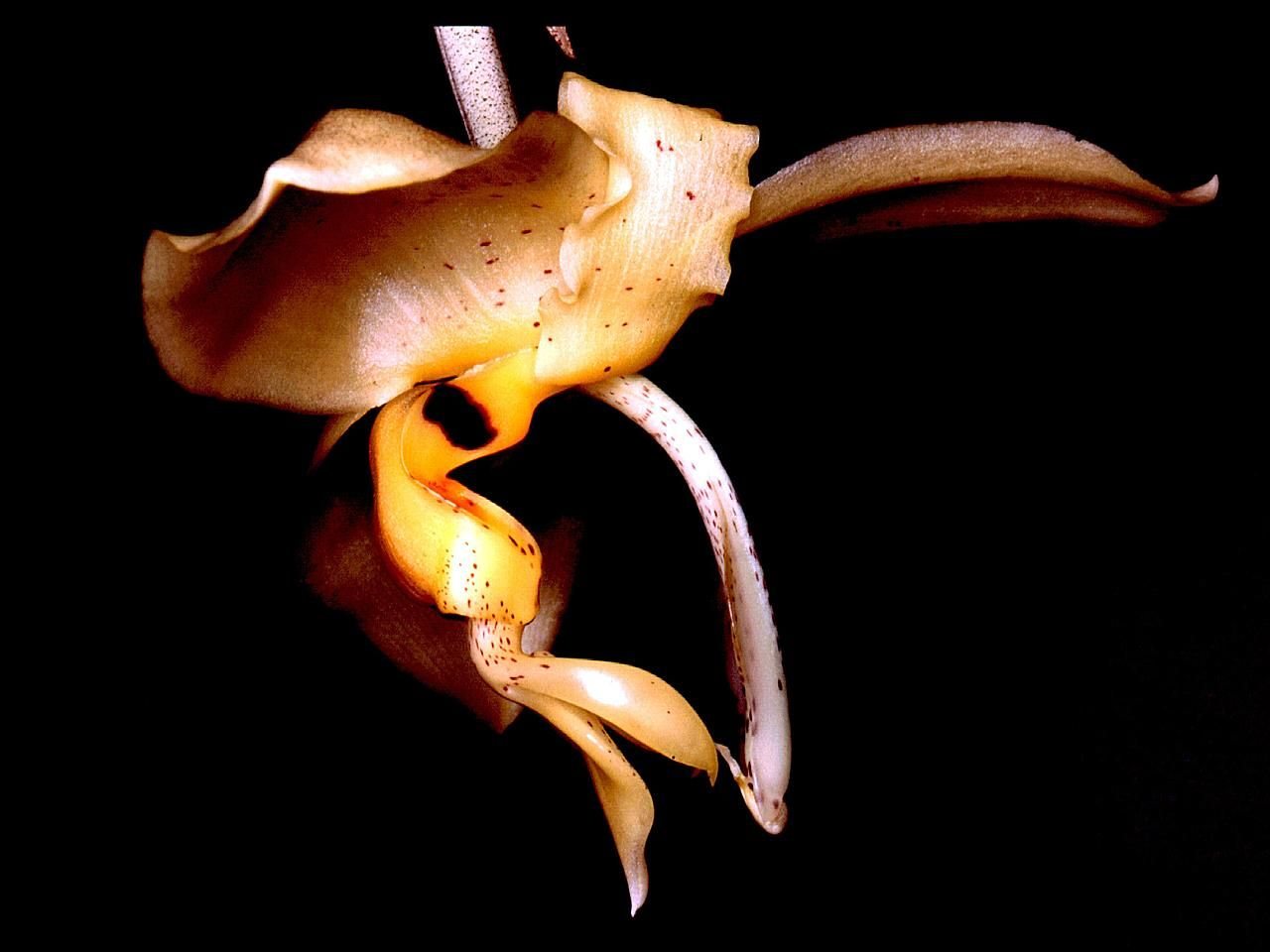 Stanhopea pozoi